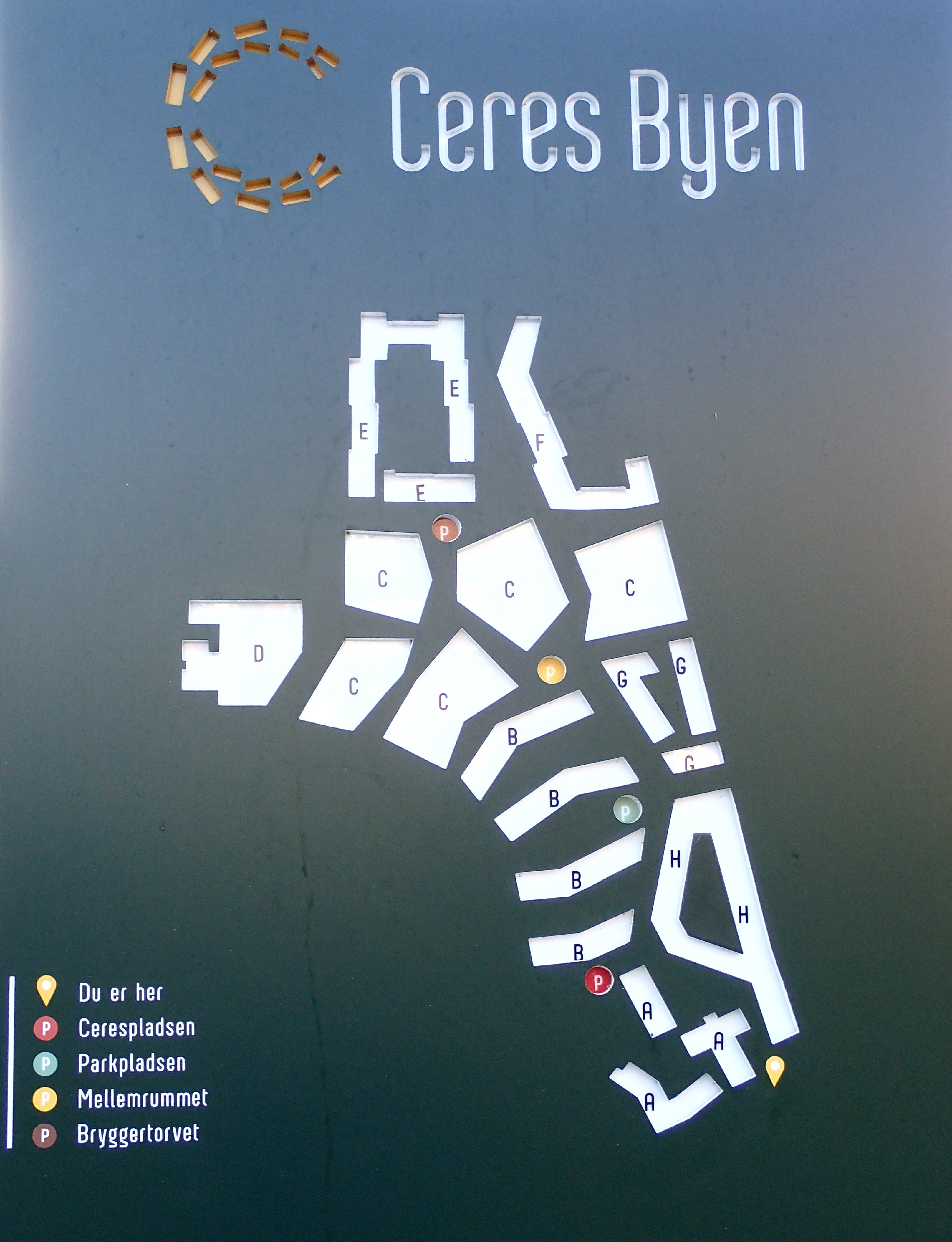 CeresByen i Aarhus.